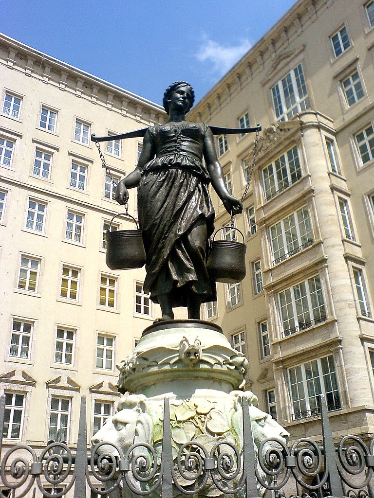 Mägdebrunnen in Leipzig, Detail. Bildhauer: Werner Stein